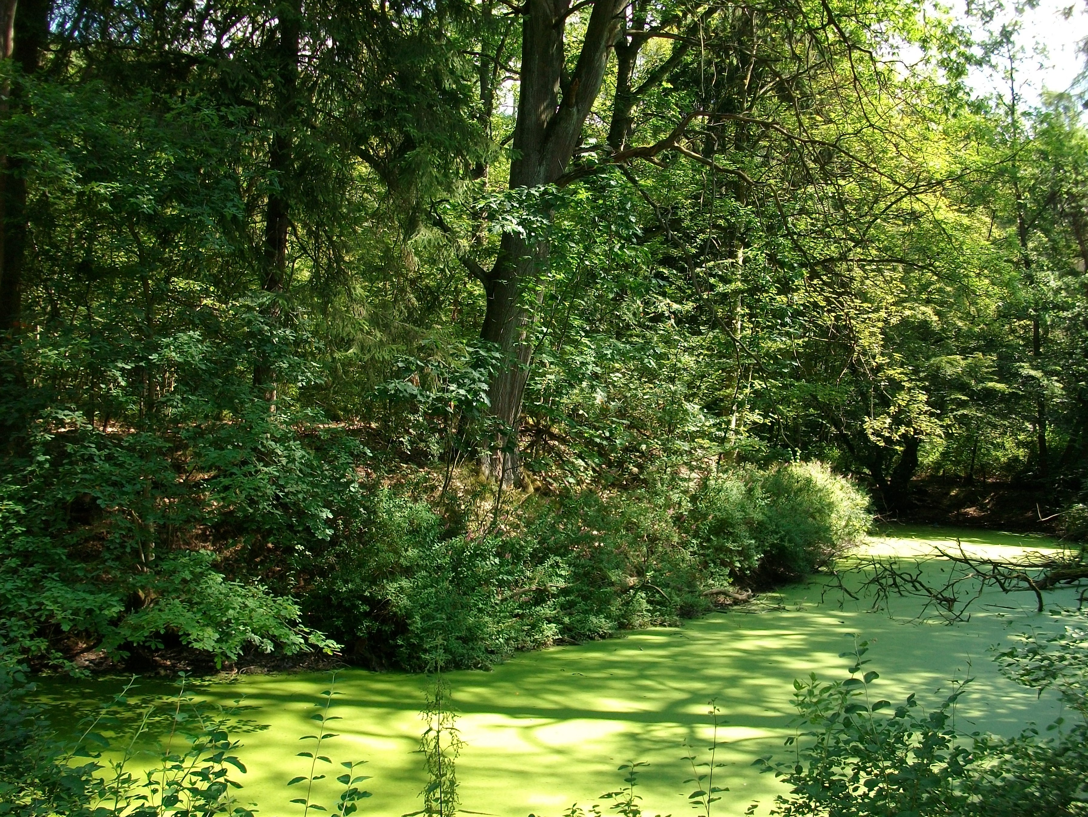 Ehemalige Wasserburg Wildshausen, Mottenhügel und Wassergraben, Arnsberg (Germany)